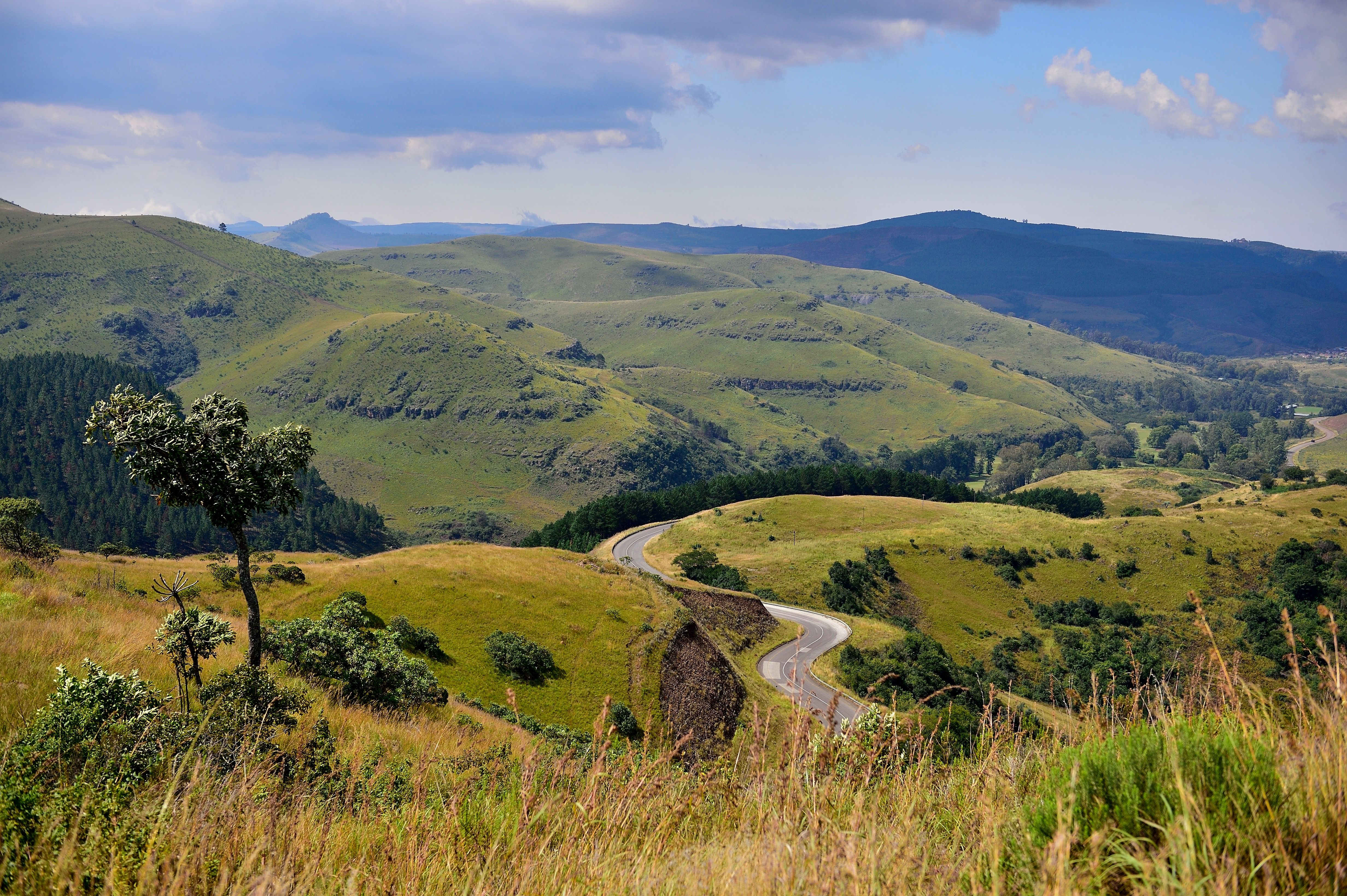 Vue du Mpumalanga.